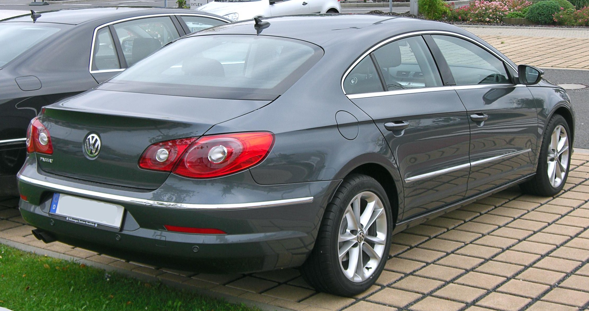 VW Passat CC